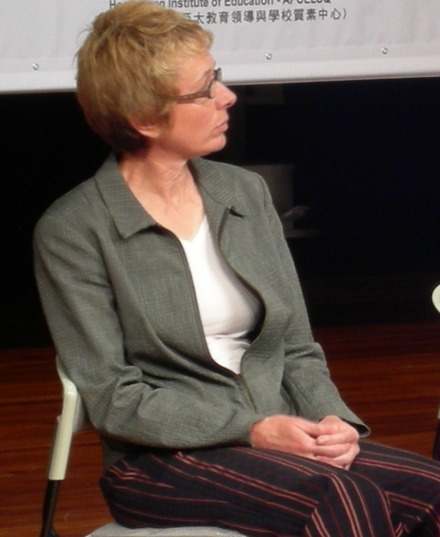 Dr. Jane Gilbert (New Zealand) in APERA 2006